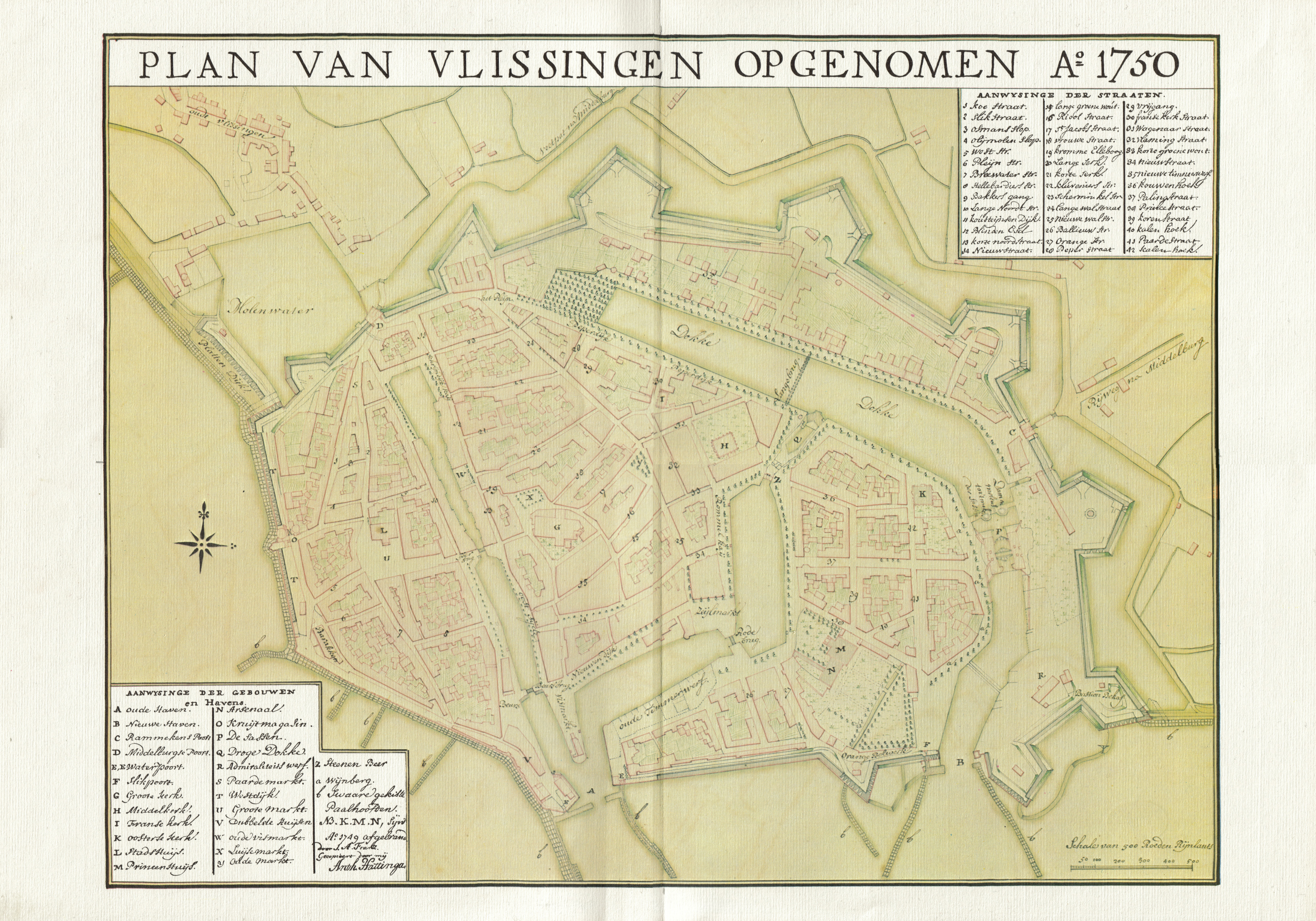 Handgetekende plattegrond van Vlissingen